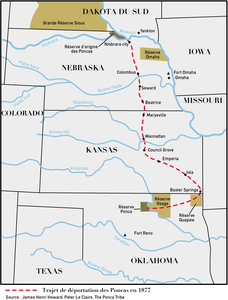 Trajet de la déportation de Standing Bear et de la tribu Ponca en 1877